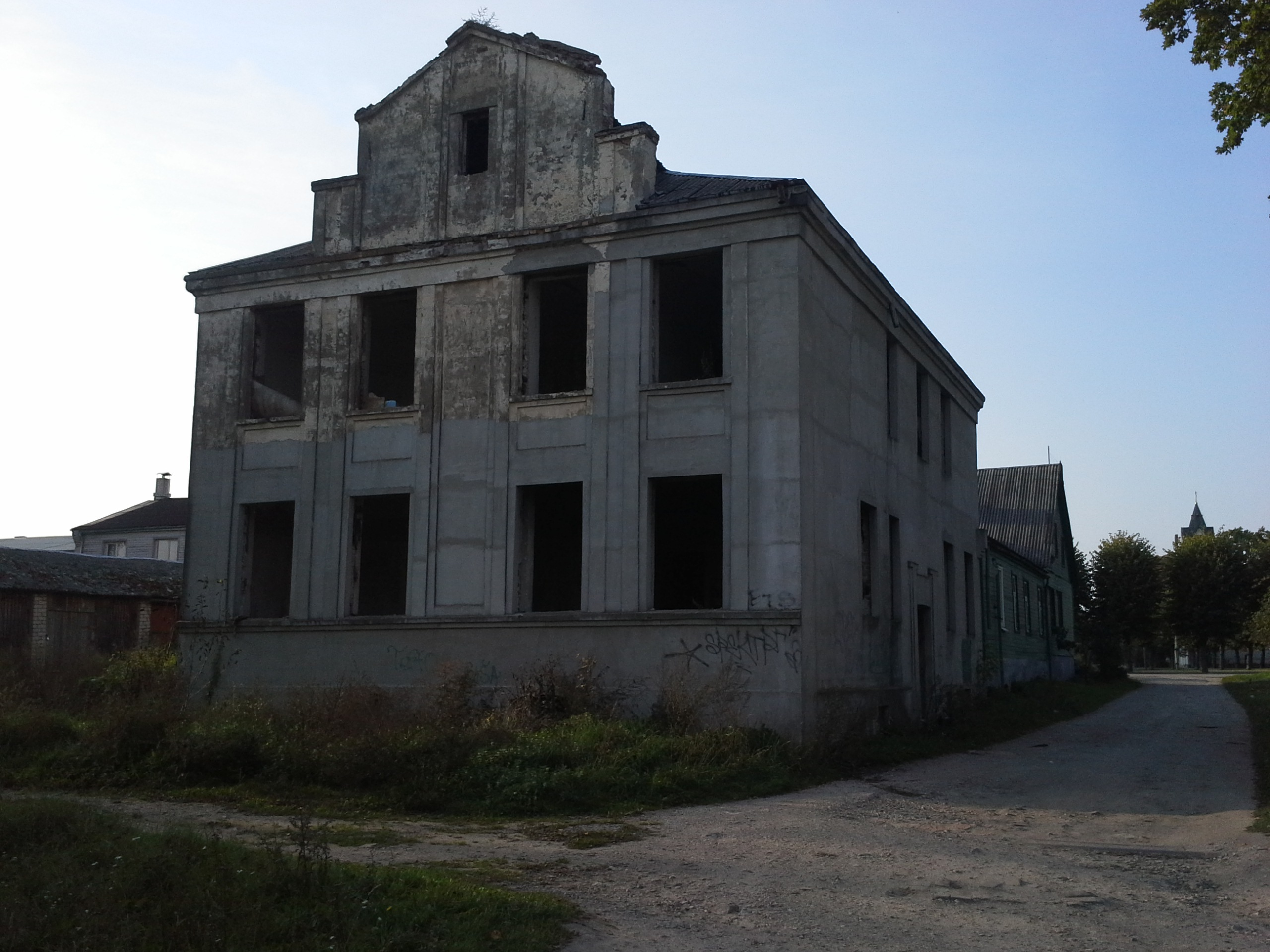 Tirgus laukuma iela 1-2, Jūrmala